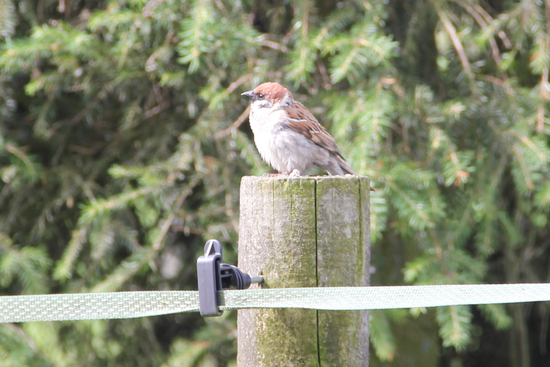 Pikkuvarpunen, Haltialan tila, Vantaa, heinäkuussa 2016